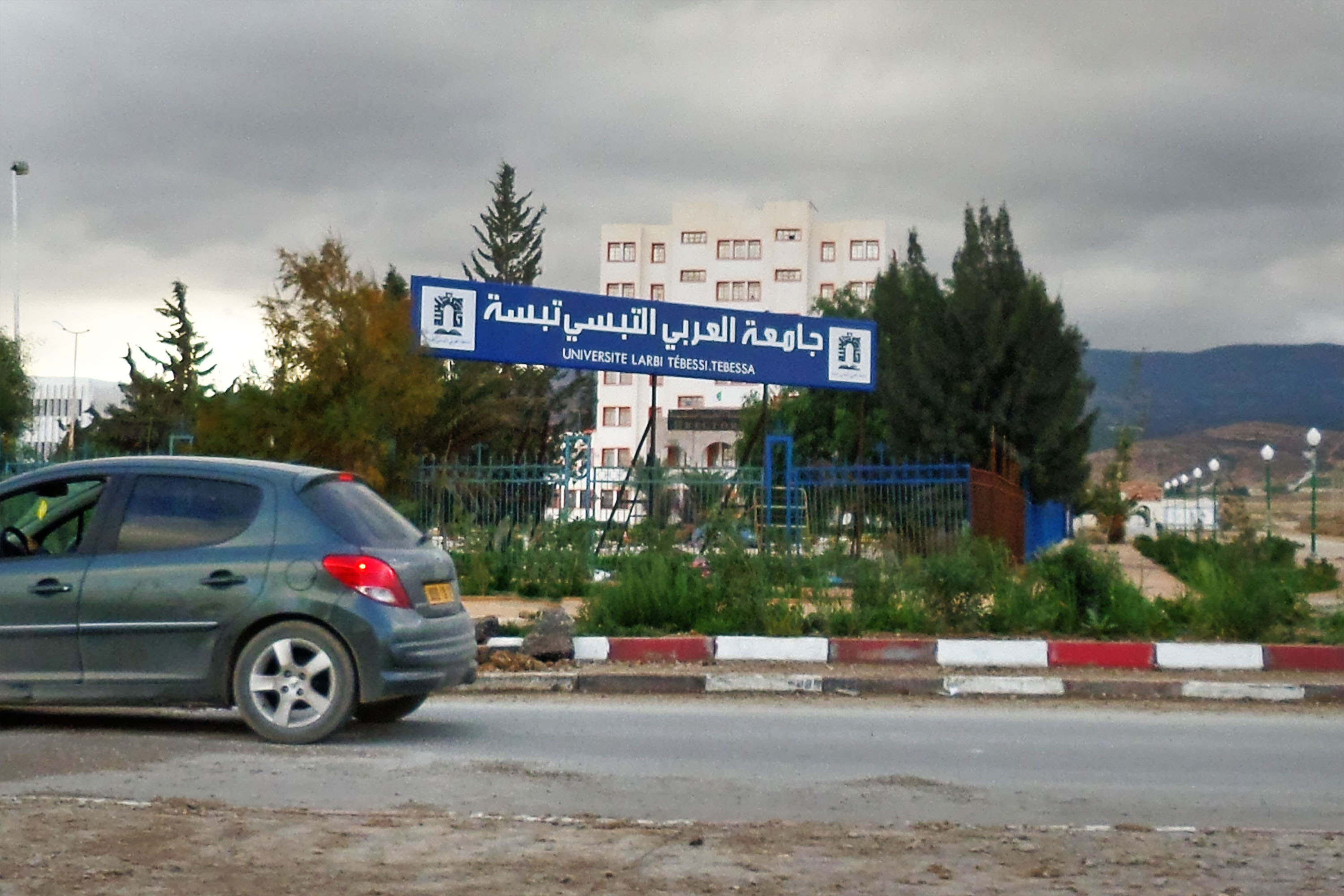 Université Larbi Tebessi جامعة العربي التبسي Wilaya de Tébessa ولاية تبسة